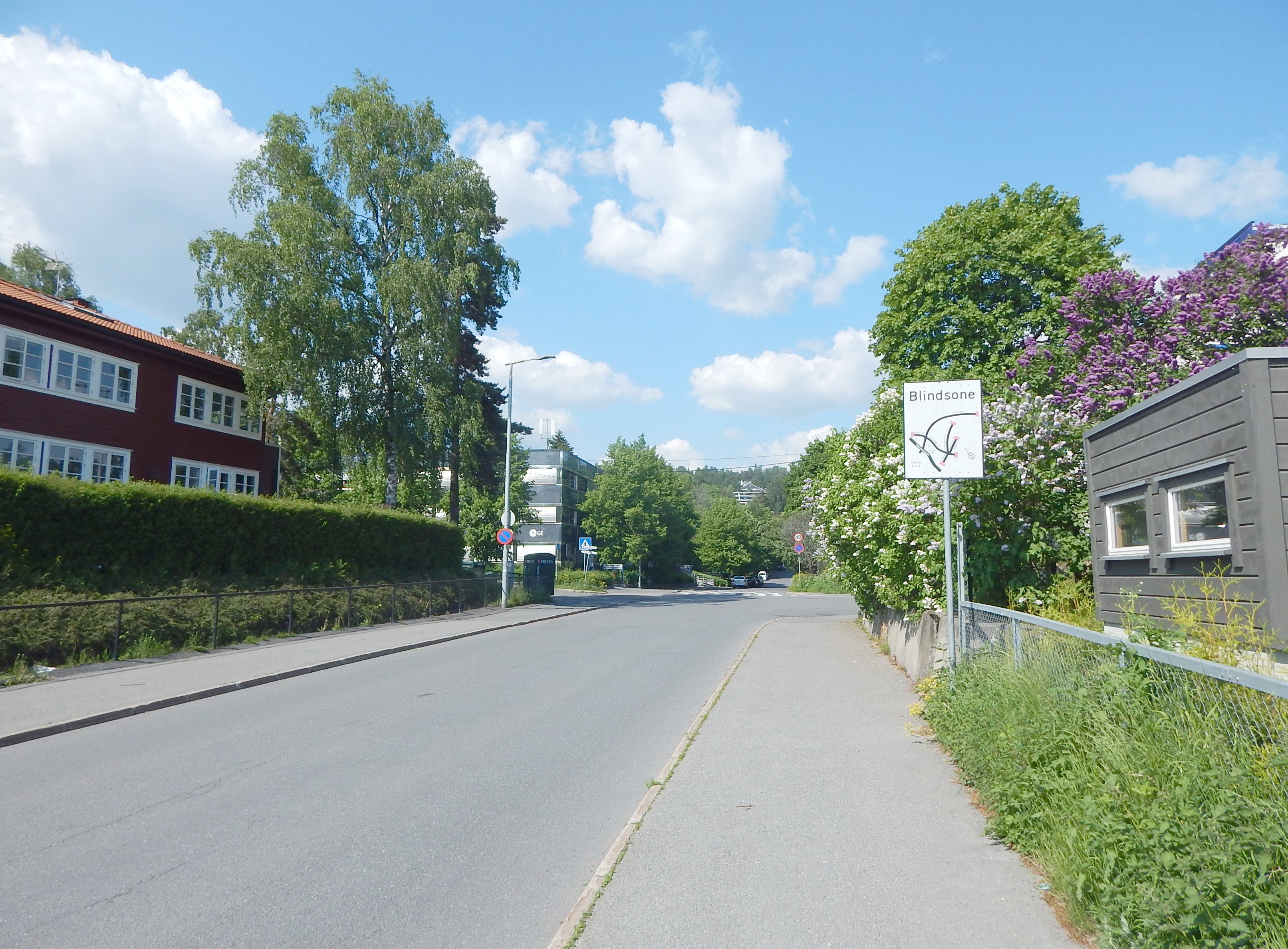 Ullern allé